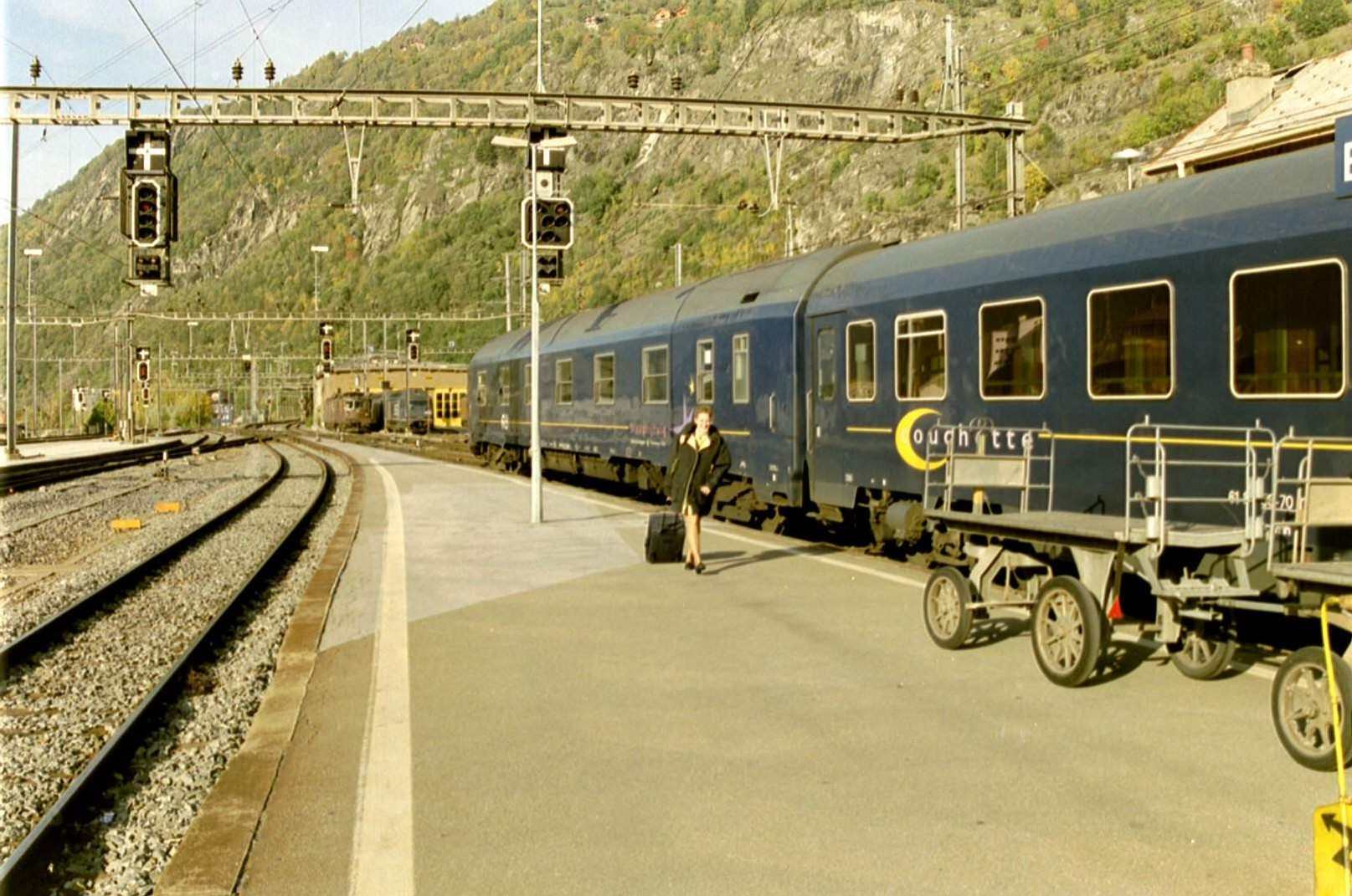 Personeel van Wagons-Lits arriveert op de eindbestemming Brig (Zwitserland) Foto gemaakt door Anne Einte Koop Categorie:Afbeelding trein